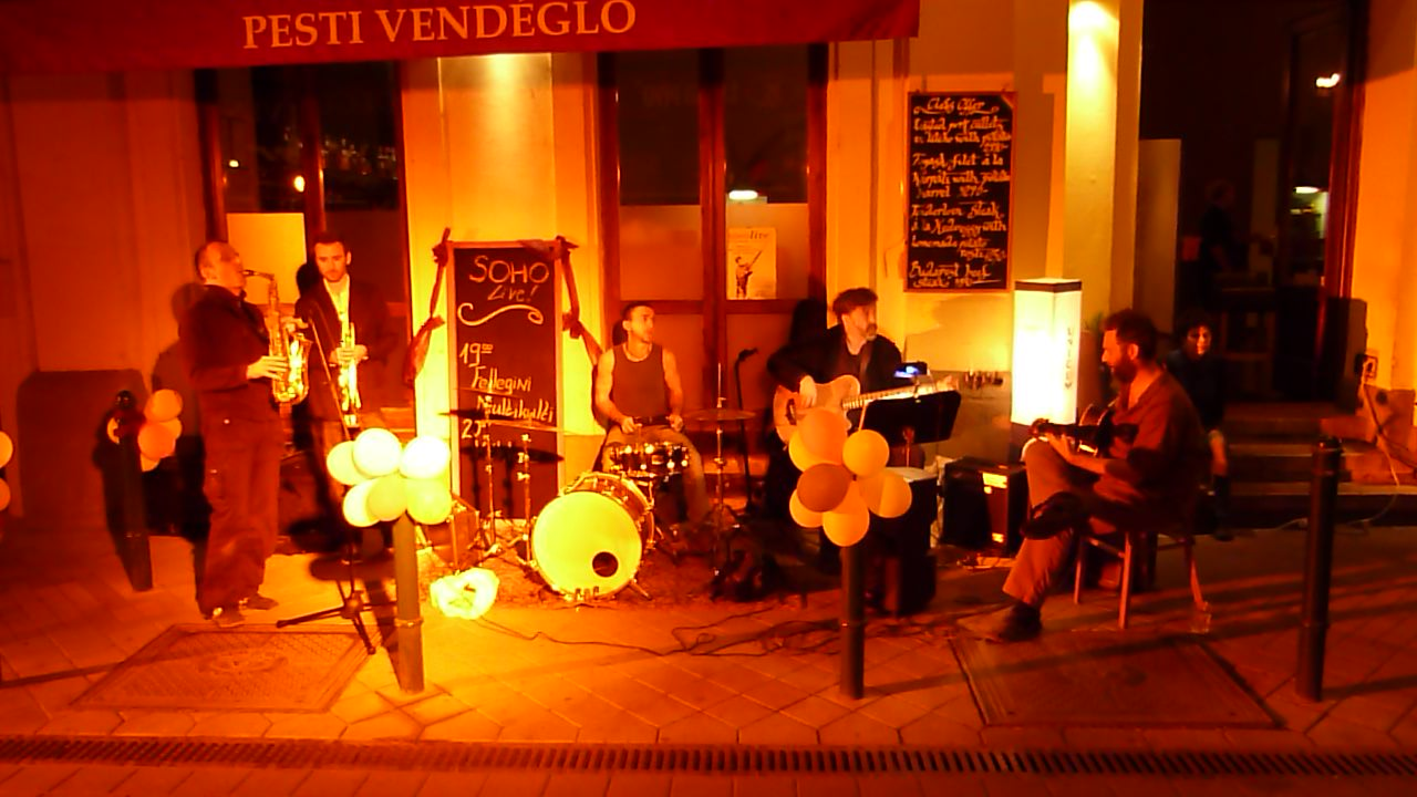 A felvétel 2011. szeptember 24 -én készült. - Budapest, IX. Ráday utca, 11.